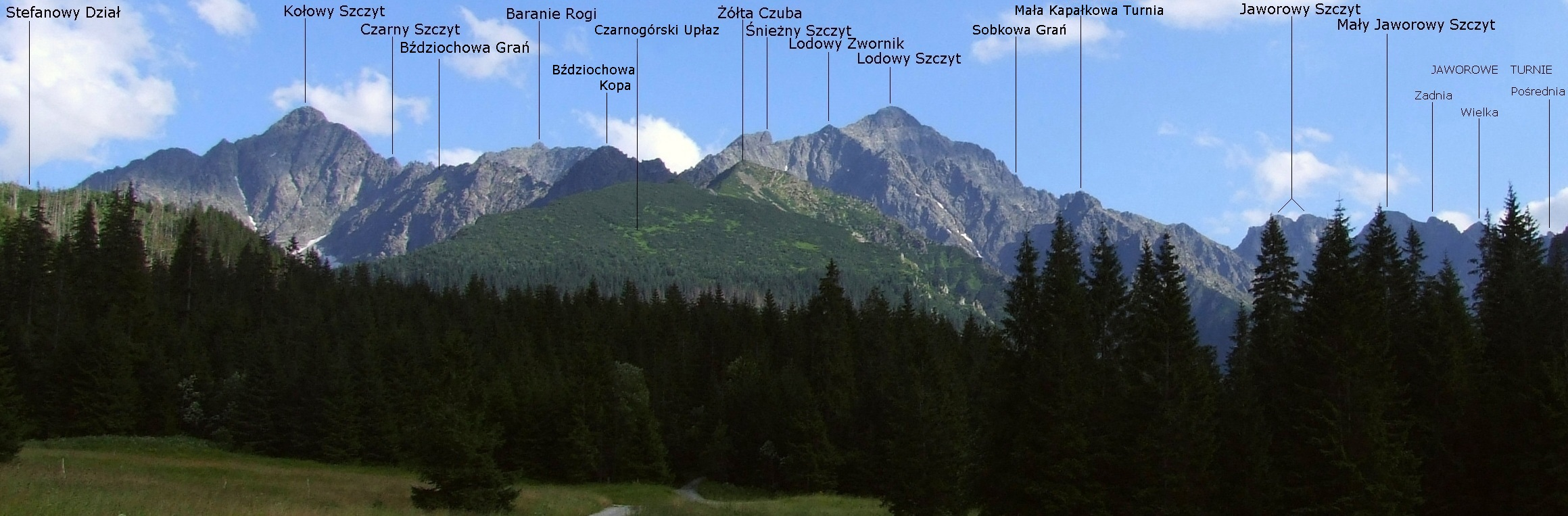 Panorama Tatr Wysokich z Gałajdówki pod Muraniem